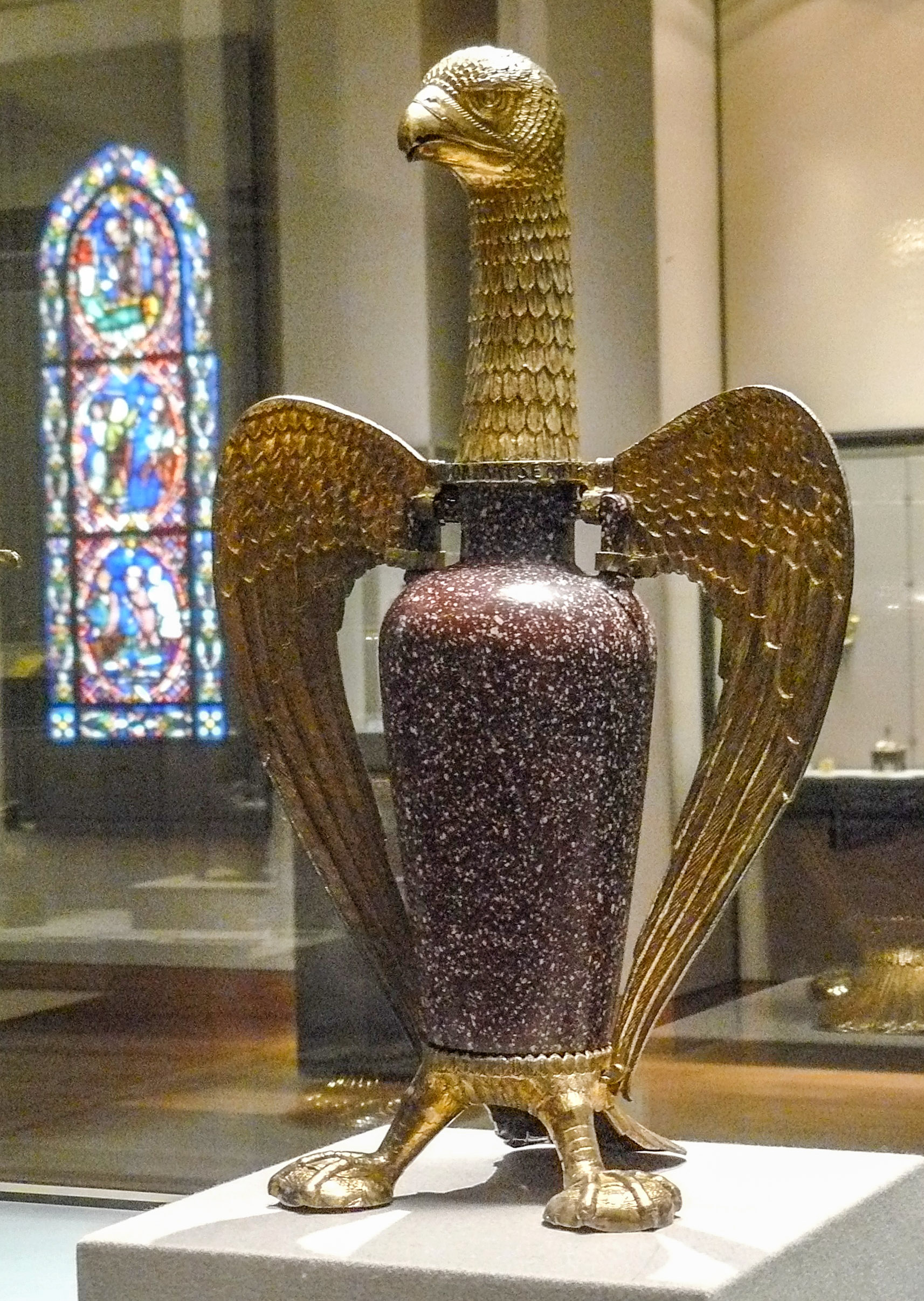 Vase liturgique dit "Aigle de Suger" Porphyre antique et argent doré - vers 1140 - Trésors de la Basilique de Saint-Denis, puis collections du Louvre. Hauteur 43 cm inv. : MR422